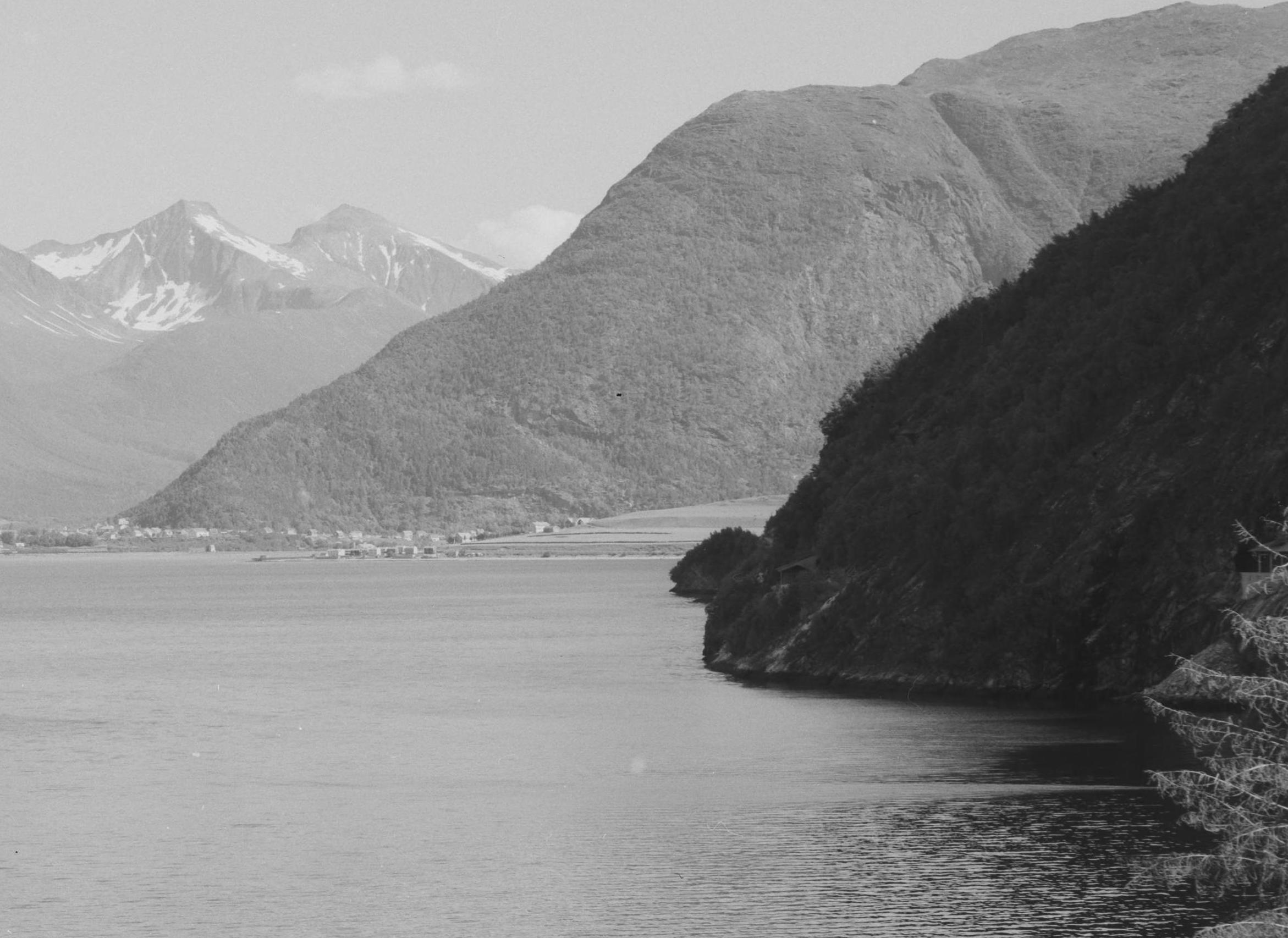 Bildet er hentet fra Nasjonalbibliotekets bildesamling Romsdalsfjorden,Veblungsnes, Rauma, Møre og Romsdal. Foto tatt fra Innholmen innover mot Åndalsnes/Veblungsnes (Nesaklsa vises tydelig), i bakgrunnen Isfjorden. Utsnitt av original, i skyggen til høyre skimtes veitraseen med tunneler og rasoverbygg.